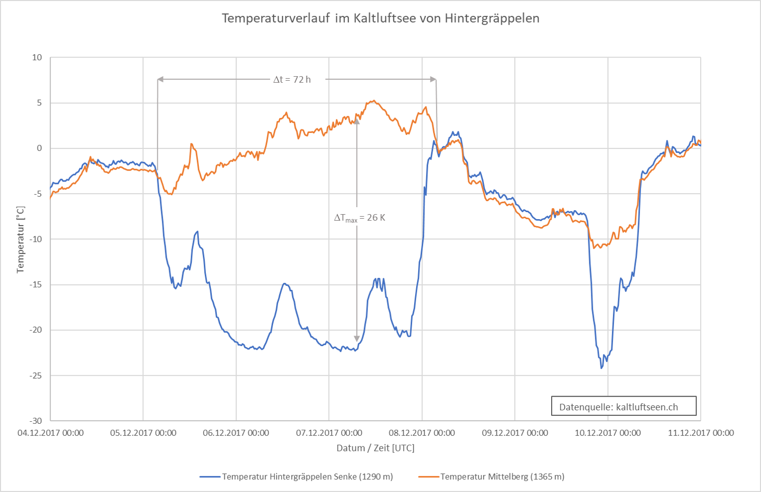 Die Graphik zeigt den Temperaturverlauf im Kaltluftsee von Hintergräppelen. Als Vergleich ist der Temperaturverlauf der 75 m höher gelegenen Hintergrundstation am Mittelberg aufgetragen. Charakteristisch für Kaltluftseen ist die Ausbildung von starken Inversionen (=Temperaturumkehr; normalerweise nimmt die Temperatur mit zunehmender Meereshöhe ab). Im vorliegenden Fall dauert die Inversion über 72 Stunden an und erreicht eine maximale Stärke von 26 Grad.